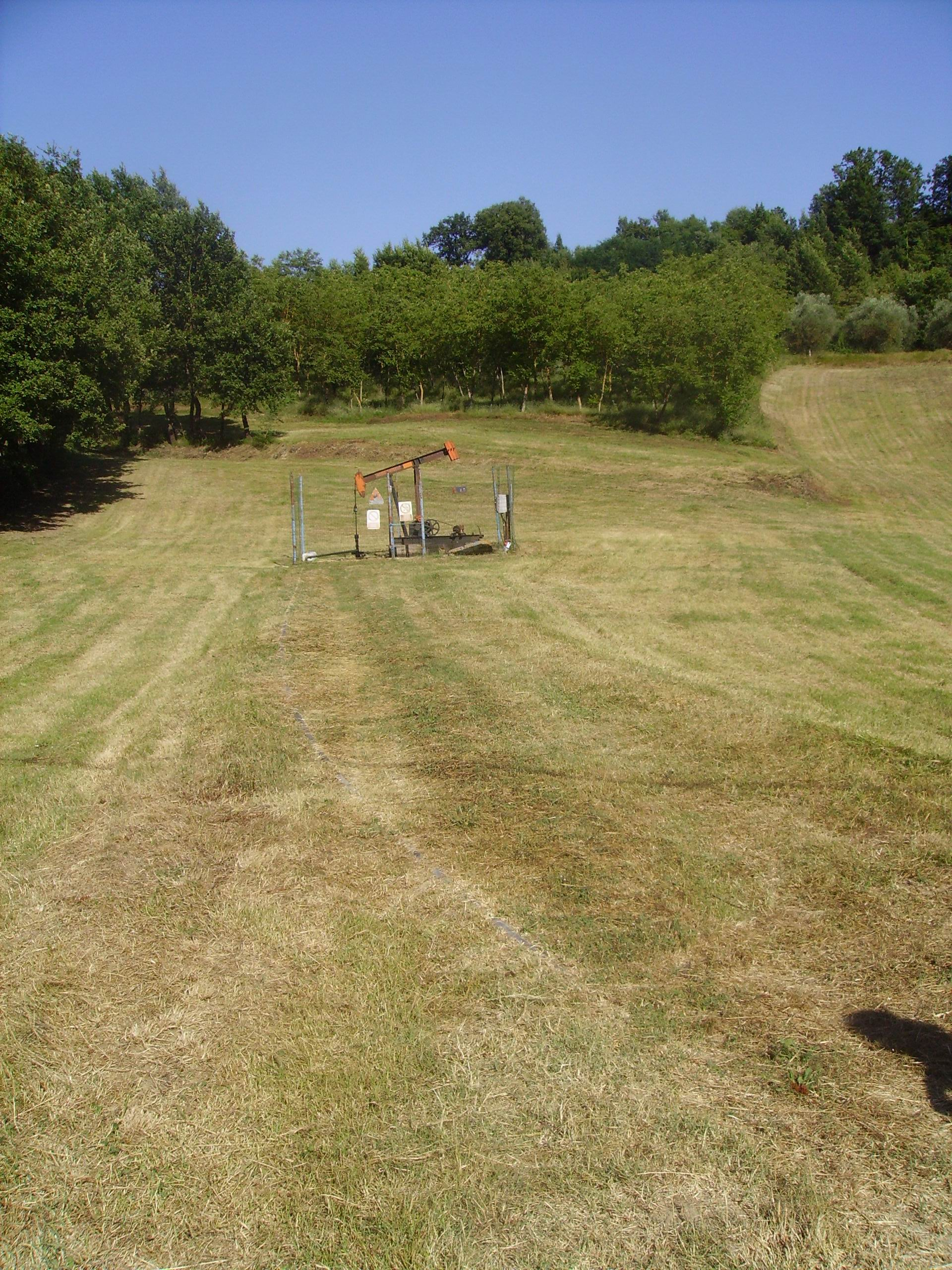 Pozzi petroliferi nelle campagne di Ripi